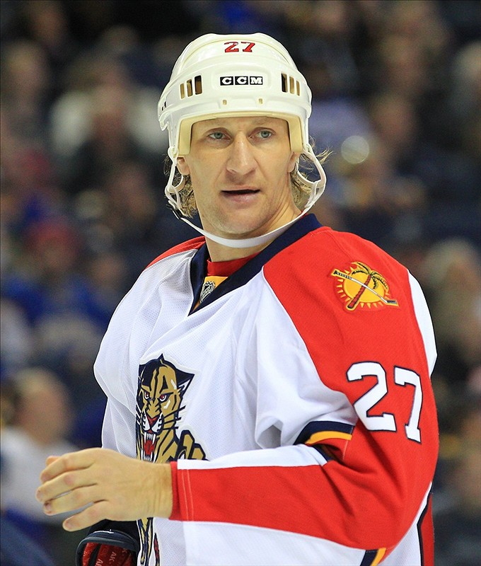 Alex Kovalev avec les Panthers de la Floride en 2013.